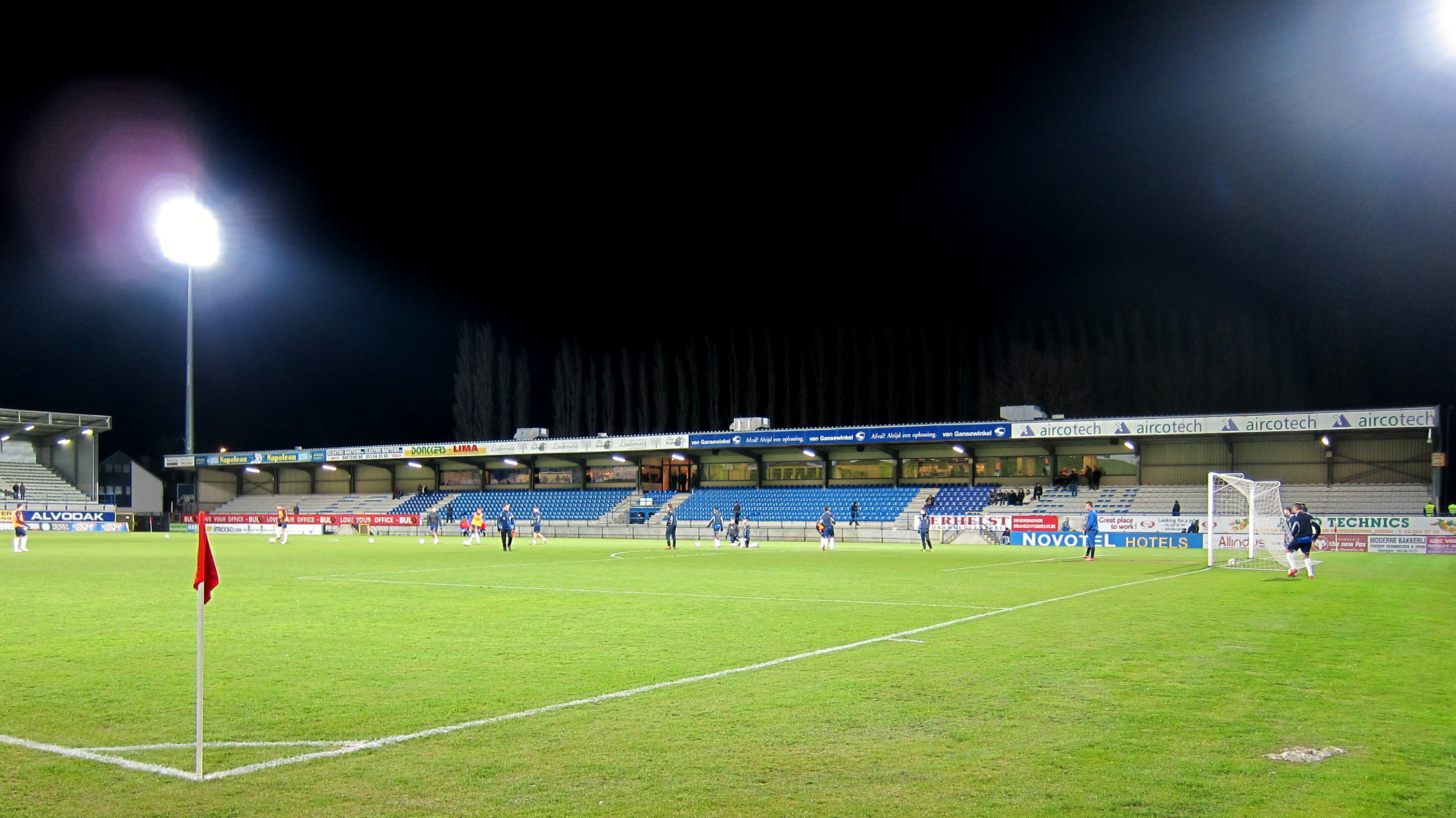 Het stadion van Dender EH, te Denderleeuw, België